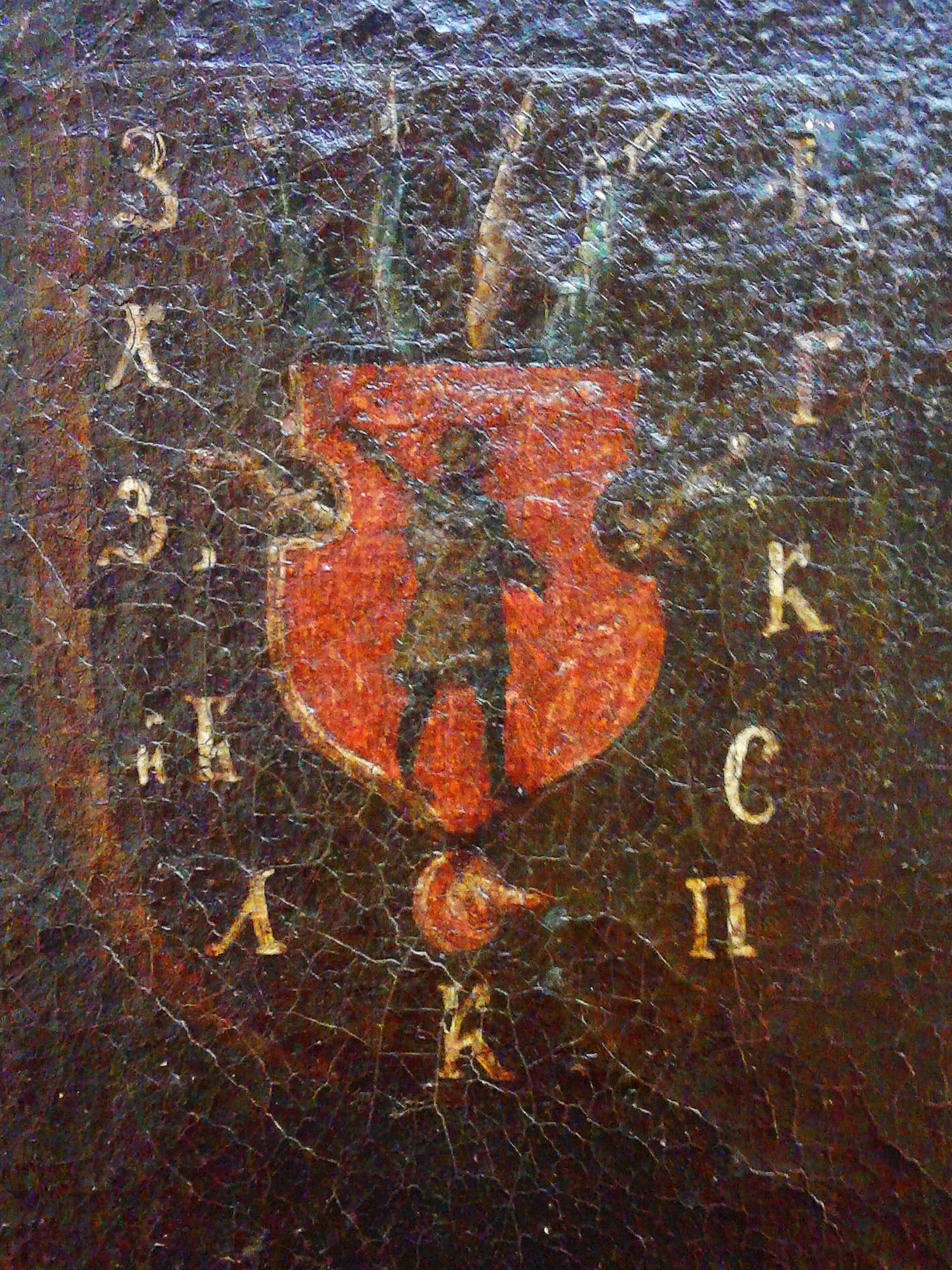 Лицар із самопалом. Фрагмент картини Богдана Хмельницького XVII- початку XVIII ст.